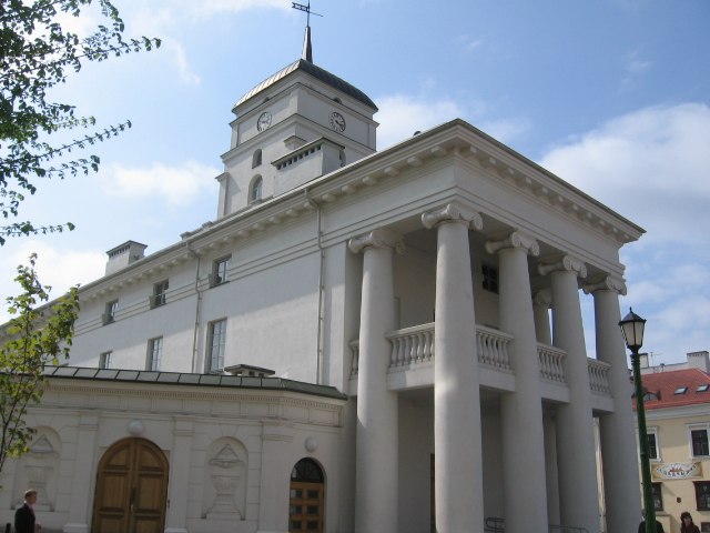 Минская ратуша. Вид сзади справа